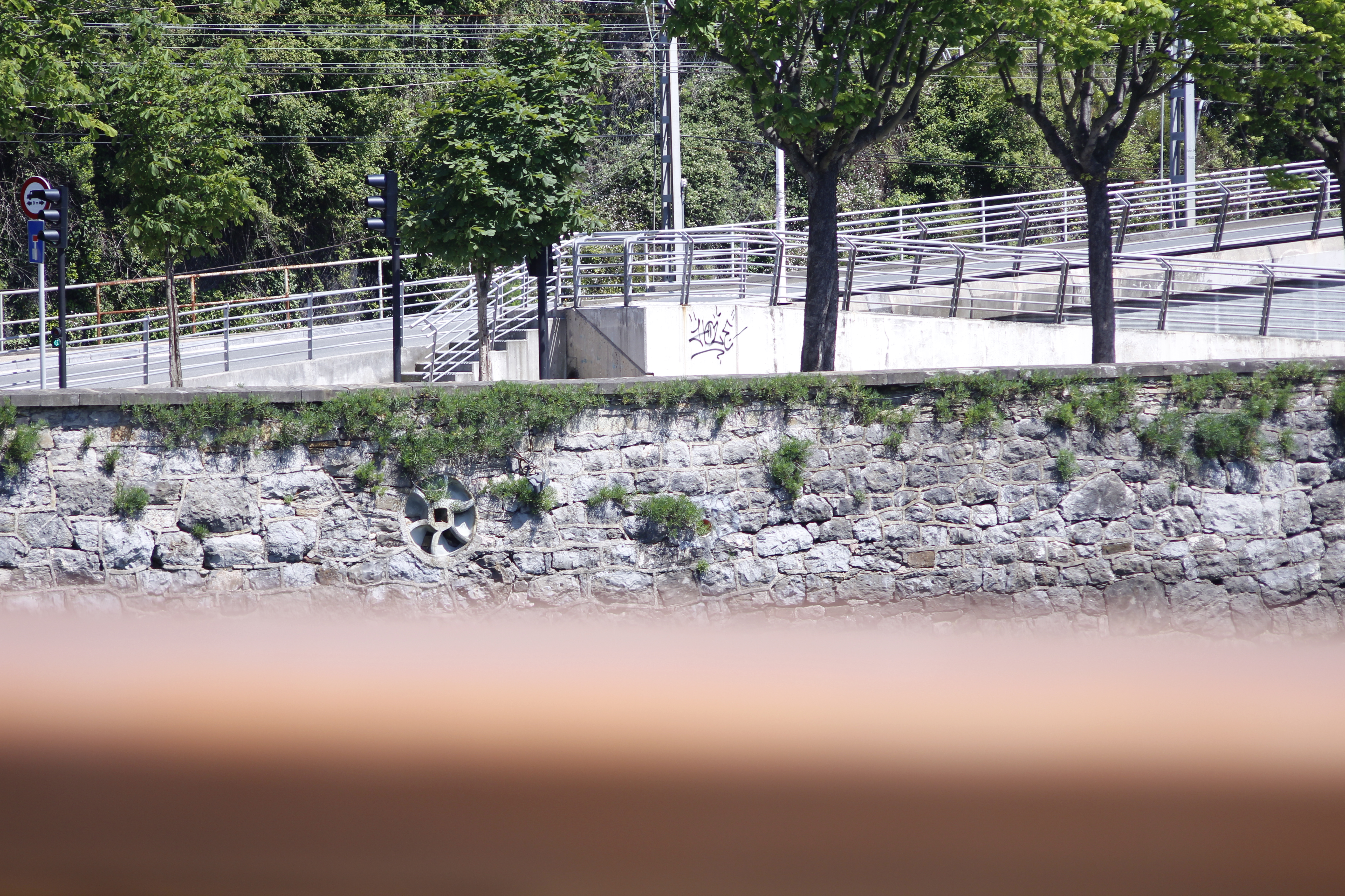 Errota Txikirena izandako gurpil hidraulikoaren xehetasuna, Urumea ibaiaren eskuin horman, Donostian, Amara auzoan